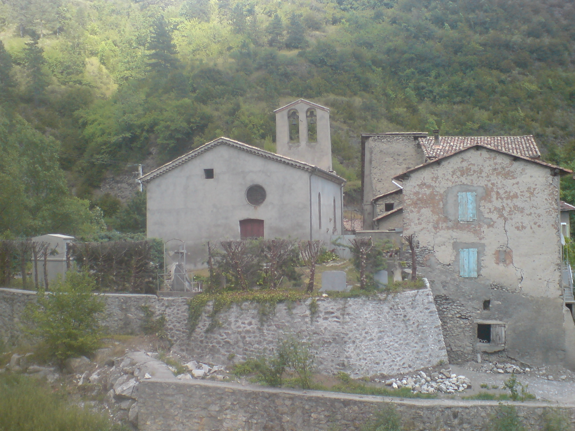 à gauche l’église paroissiale ; à droite, le bâtiment qui abrite la mairie.